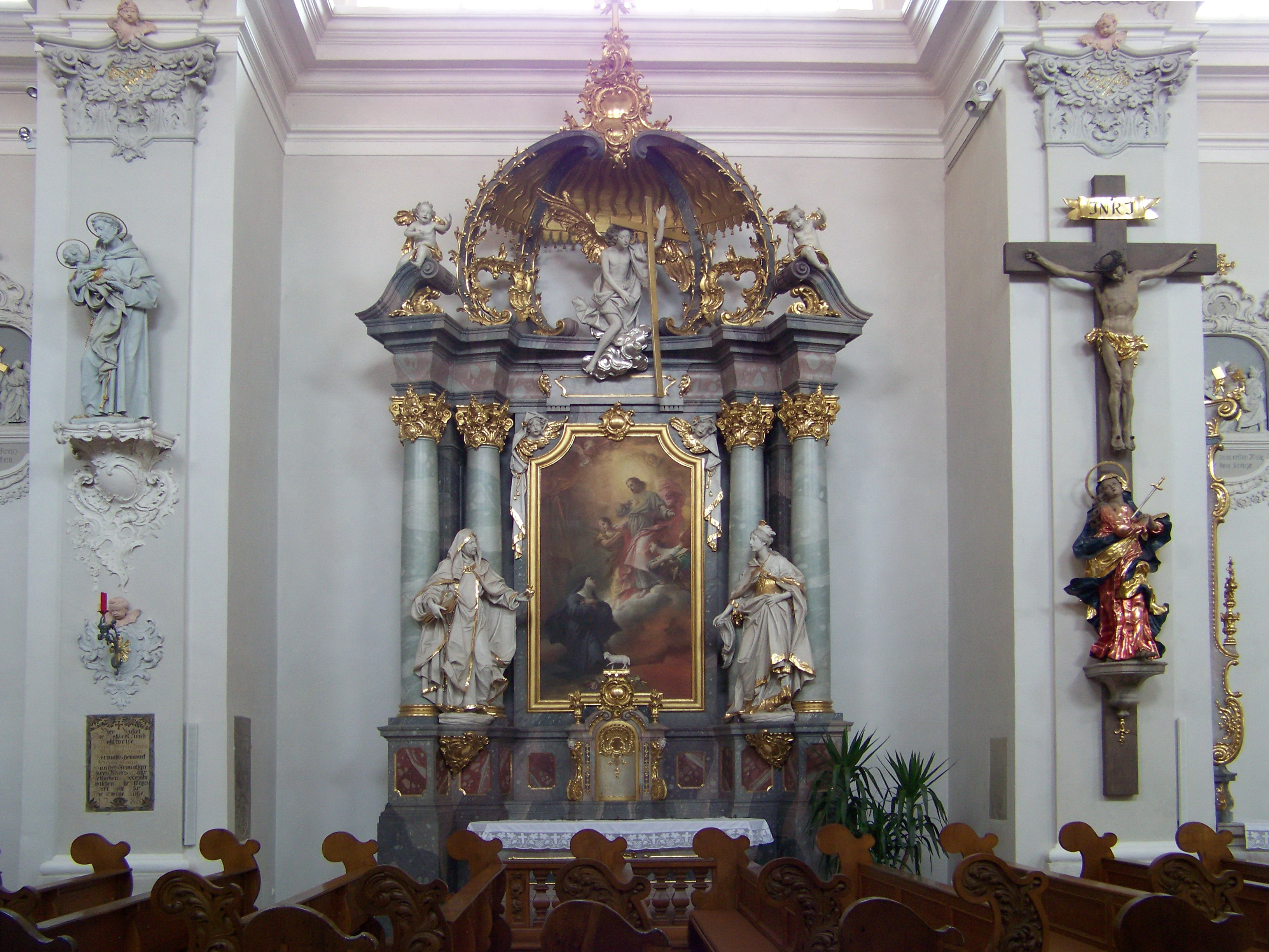 Cham in der Oberpfalz. Kirchplatz 2; Marktplatz 2. Katholische Pfarrkirche St. Jakob. Herz-Jesu an der Südwand des Langhauses. Das Altarbild zeigt eine Herz-Jesu Darstellung vor der eine Nonne betet. Die Seitenfiguren stellen St. Alruna und St. Theresa dar.